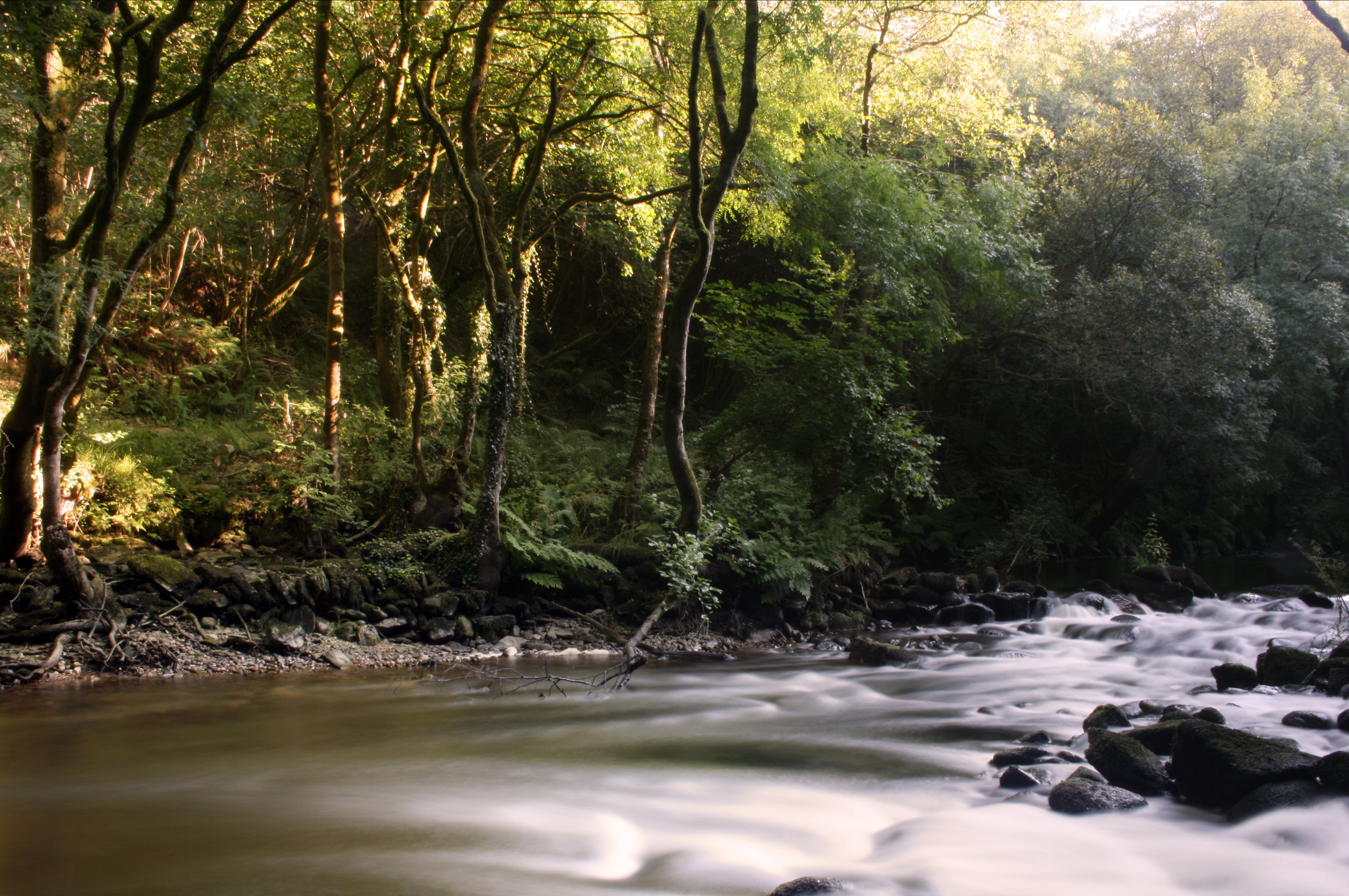 Rio Mandeo a su paso por Chelo